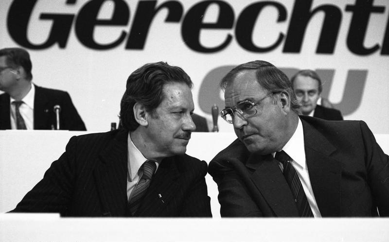 26. Bundesparteitag der CDU in der Friedrich-Ebert-Halle in Ludwigshafen 23.-25.10.1978